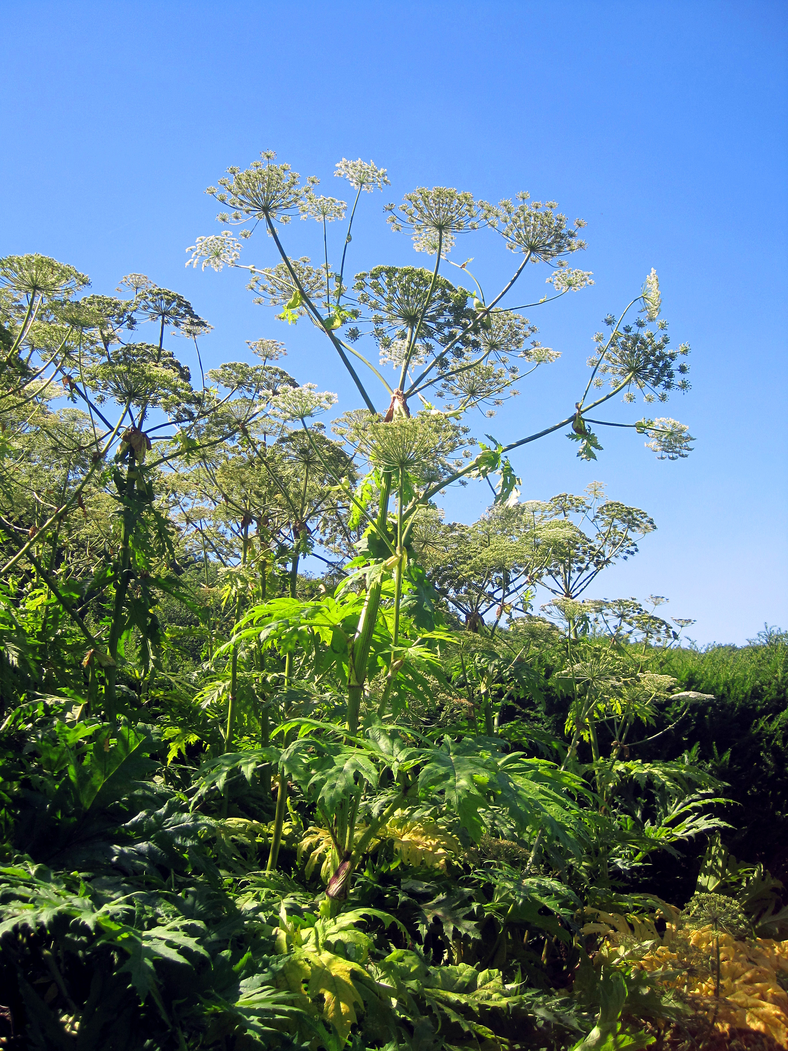 berce du Caucase (Heracleum mantegazzianum) - Plante invasive, dangereuse et nocive photographiée dans les Jardins de Valloires à Argoules, France.